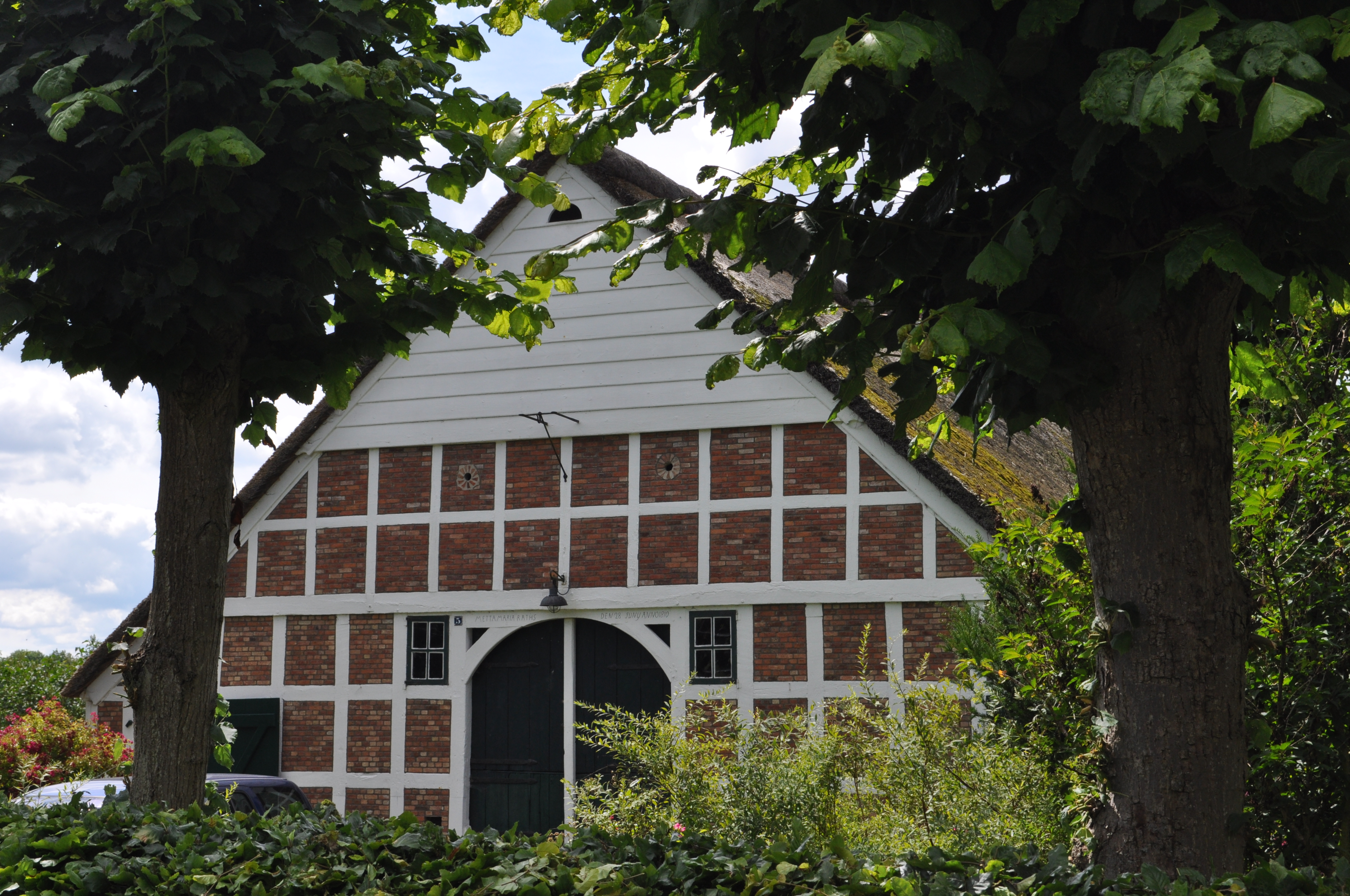 Wohnhaus Sethlerhemmer Fährweg 5. This is a photograph of an architectural monument. .202.200.052